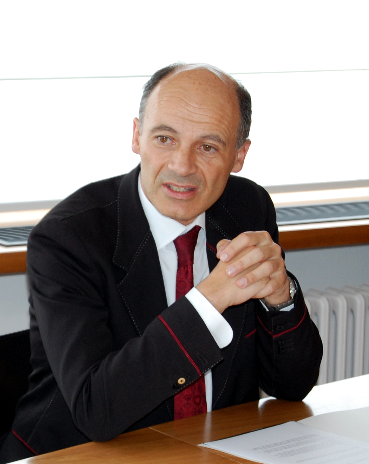 Belgian child psychiatrist Peter Adriaenssens.